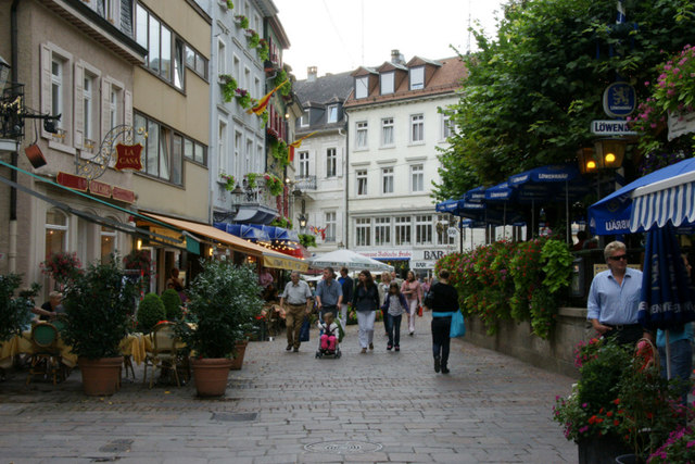 Jesuitenplatz, Baden Baden